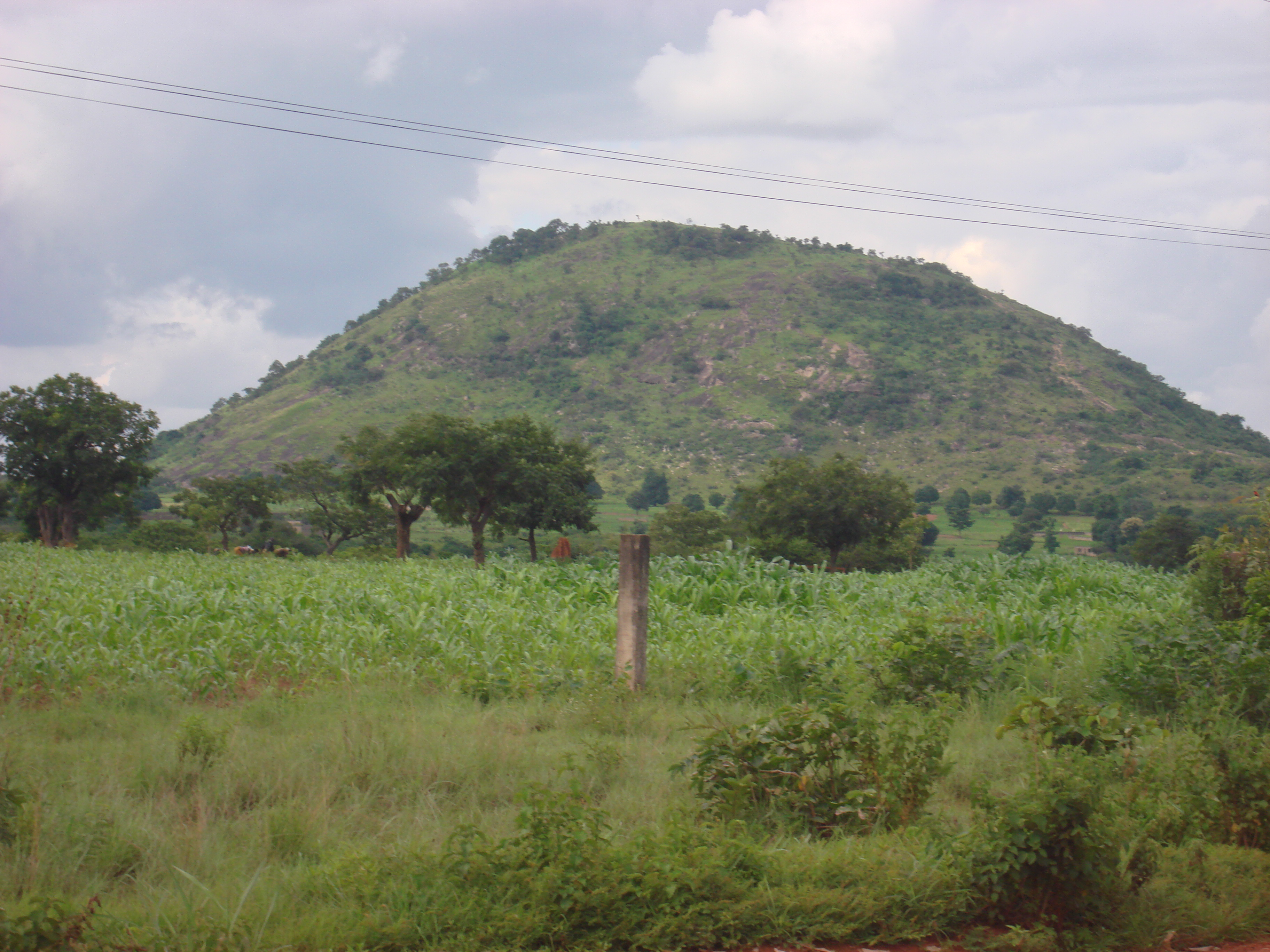 Mont Korhogo, près de la ville du même nom, Région des savanes de Côte d'Ivoire